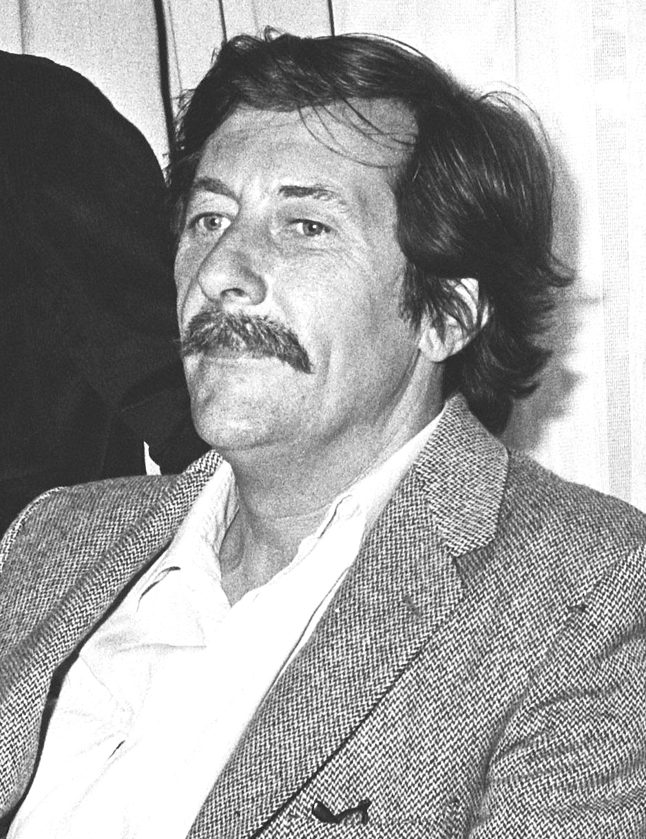 Collectie / Archief : Fotocollectie Anefo Reportage / Serie : Franse filmacteurs Beschrijving : Jean Rochefort Datum : 16 mei 1979 Trefwoorden : acteurs Persoonsnaam : Rochefort Jean Fotograaf : Dijk, Hans van / Anefo Auteursrechthebbende : Nationaal Archief Materiaalsoort : Negatief (zwart/wit) Nummer archiefinventaris : bekijk toegang 2.24.01.05 Bestanddeelnummer : 930-2697